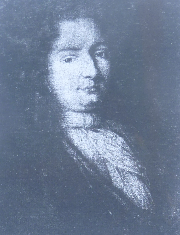 Portrait de Jean Hyacinthe Tréouret de Kerstrat (1774-1795)